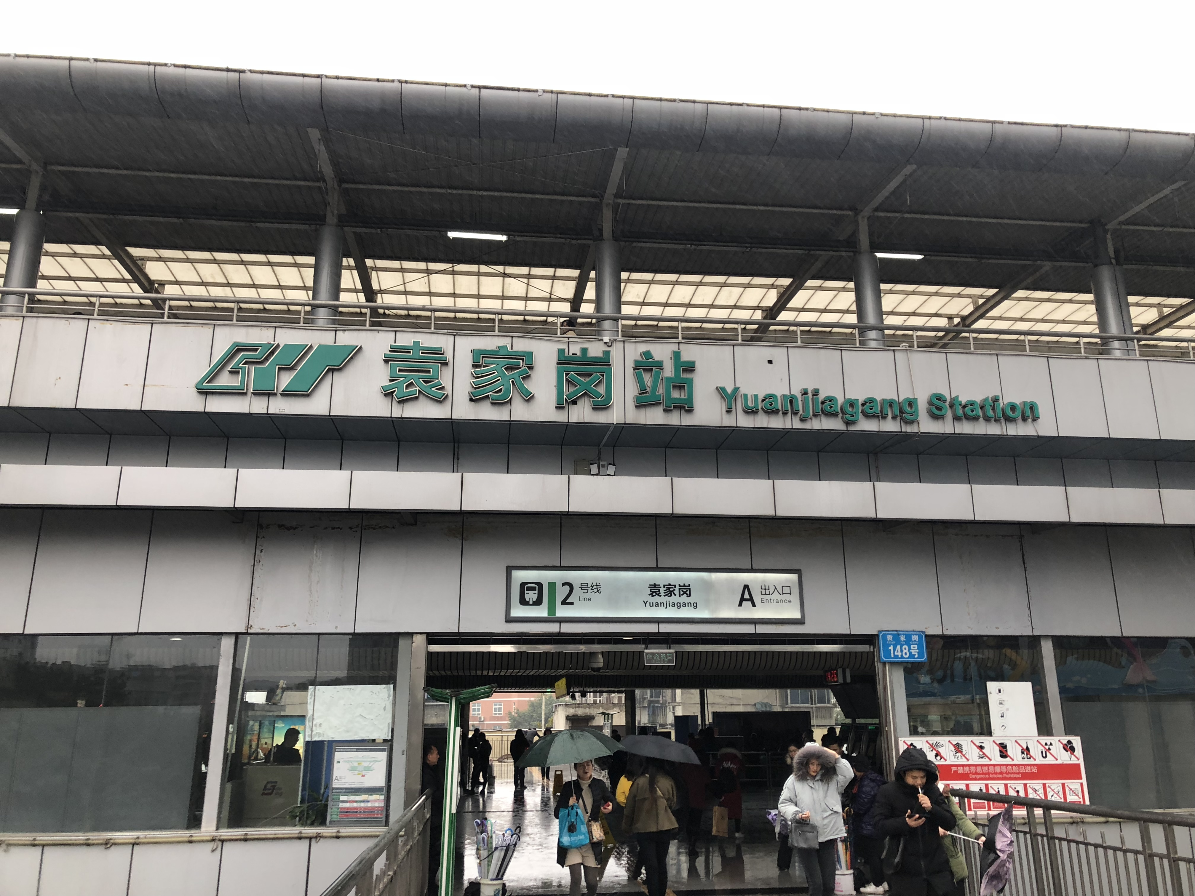 2 号线袁家岗站 A 出口